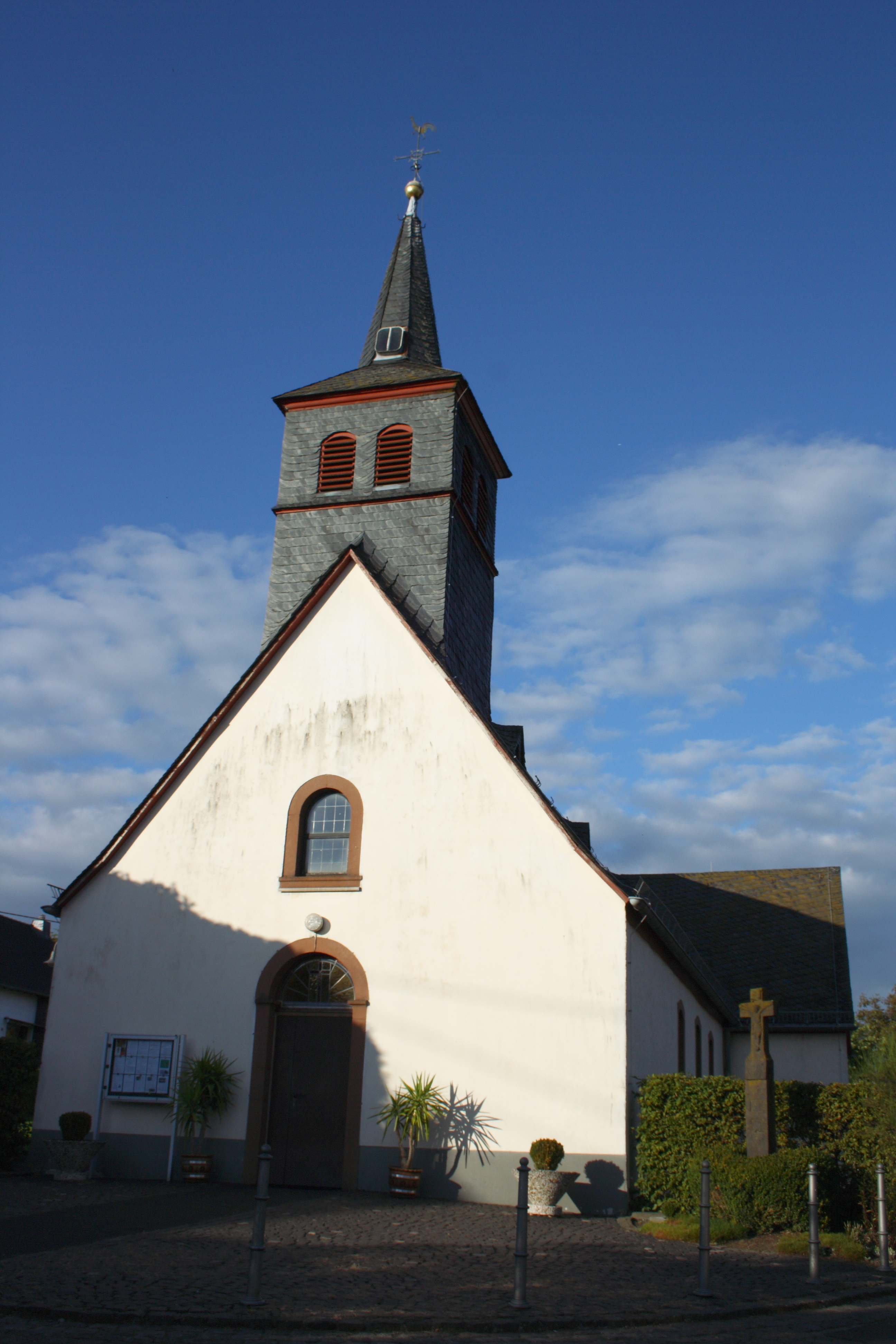 katholische Kirche Maria Rosenkranzkönigin in Auderath im Landkreis Cochem-Zell (Rheinland-Pfalz)